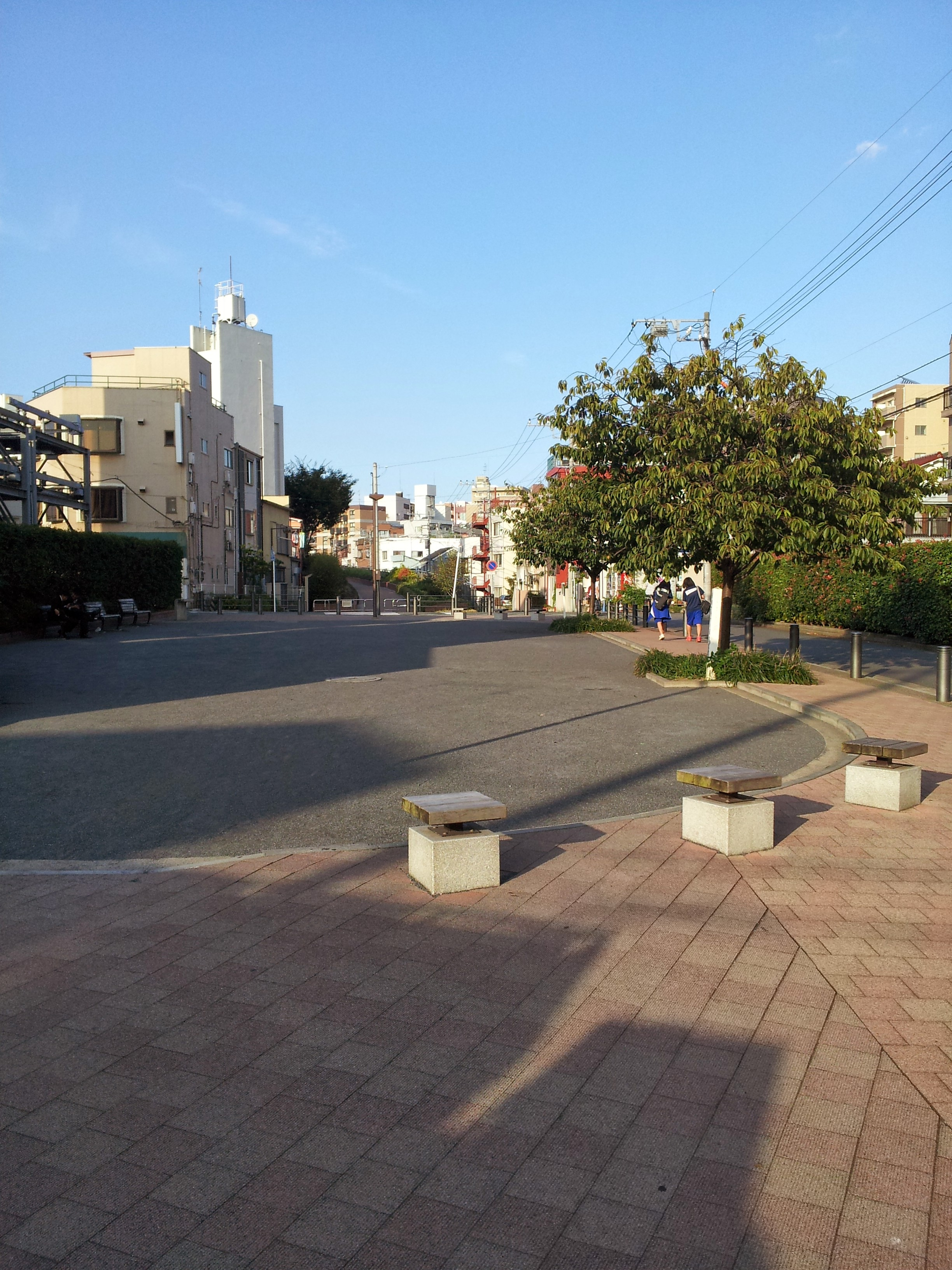 Hirodaiotamachi, Kanagawa Ward, Yokohama, Kanagawa Prefecture 221-0824, Japan